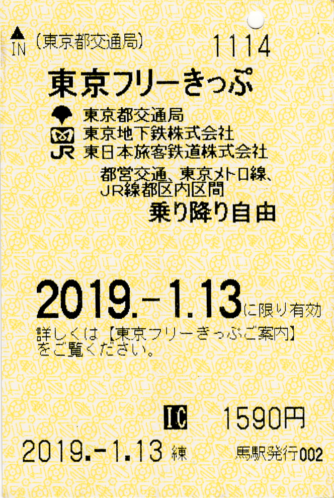 東京都交通局 東京フリーきっぷ 本券 練馬駅発行